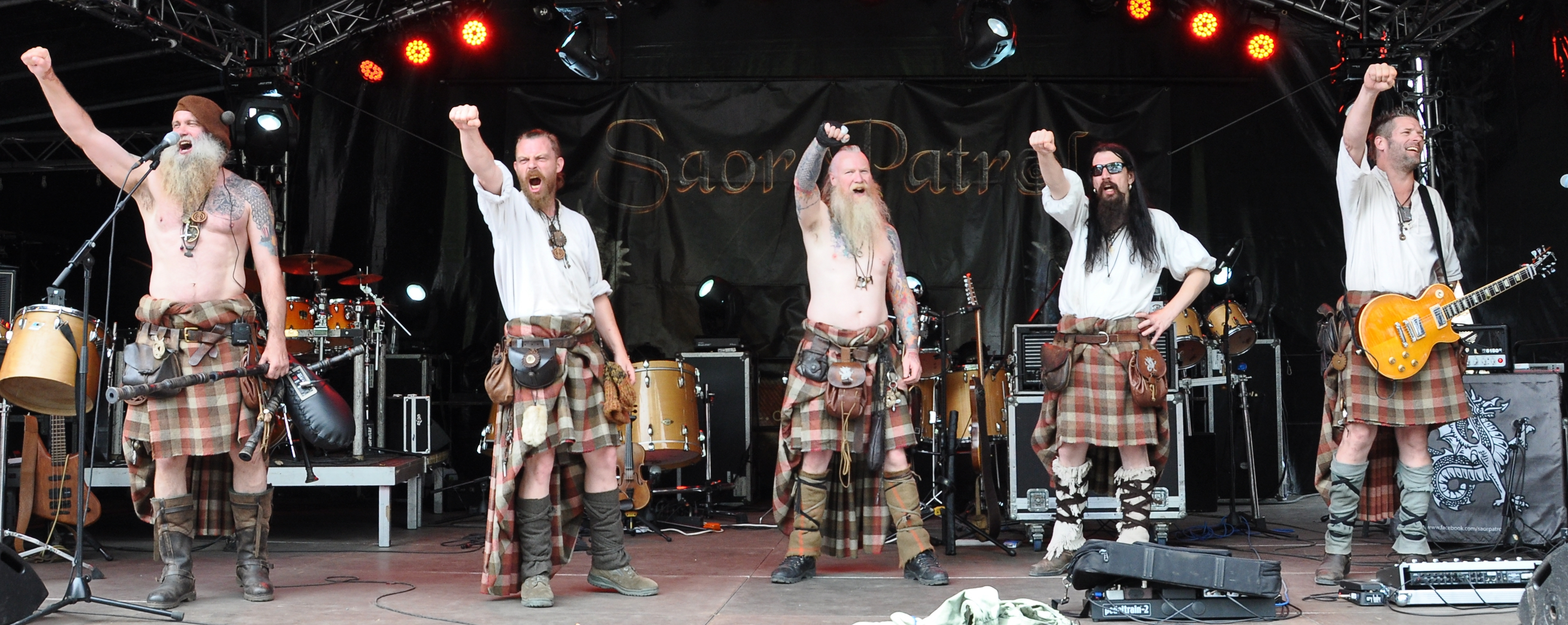 Saor Patrol beim MPS 2015 in Wassenberg